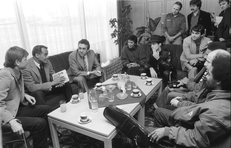 ADN/Settnik/25.10.83/ Berlin: Der 1. Sekretär des Zentralrates der FDJ, Egon Krenz (3.v.l.), begrüßte auf dem Flughafen Berlin-Schönefeld den amerikanischen Volkssänger Harry Belafonte (2.v.l.). Der international bekannte Friedenssänger wird am Abend des 25.10. gemeinsam mit dem BRD-Sänger Udo Lindenberg (5.v.l.) bei einem Konzert für den Frieden mitwirken. Anwesend waren Frau Belafonte (4.v.l.) und Hartmut König (r. sitzend).